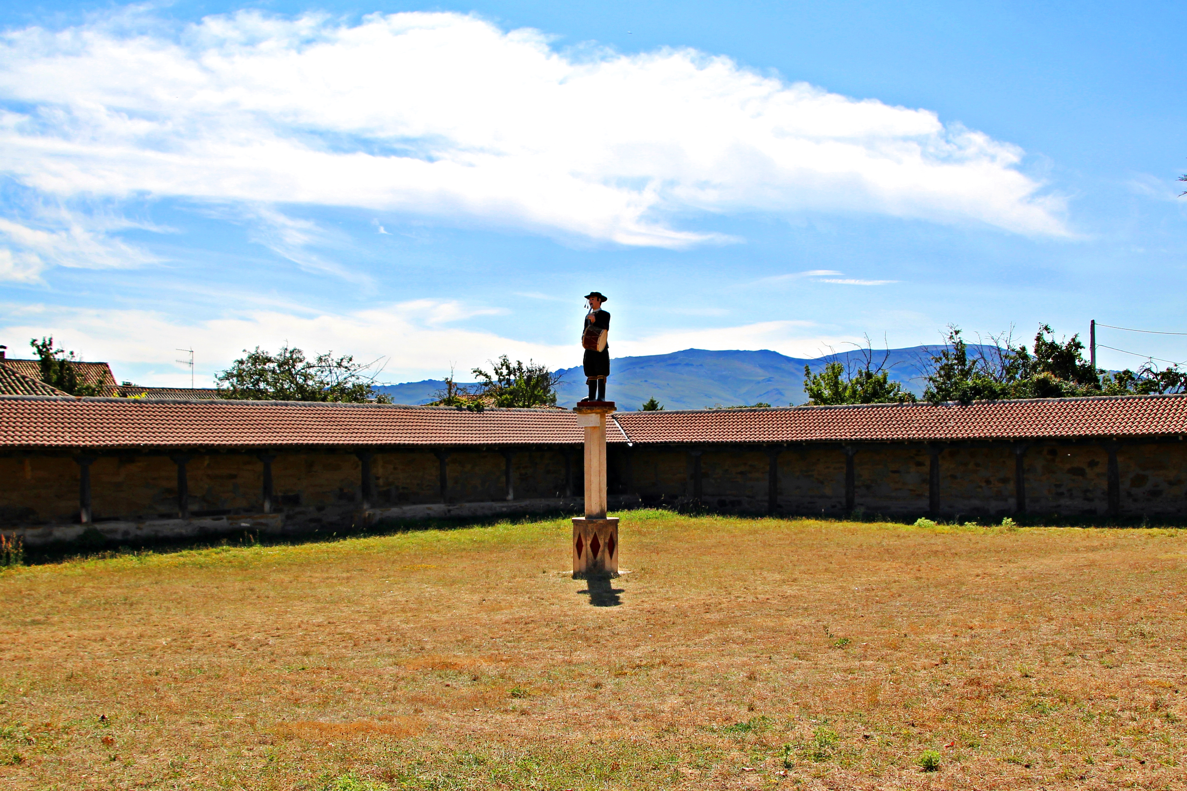 Luyego, La Maragatería en la provincia de León.